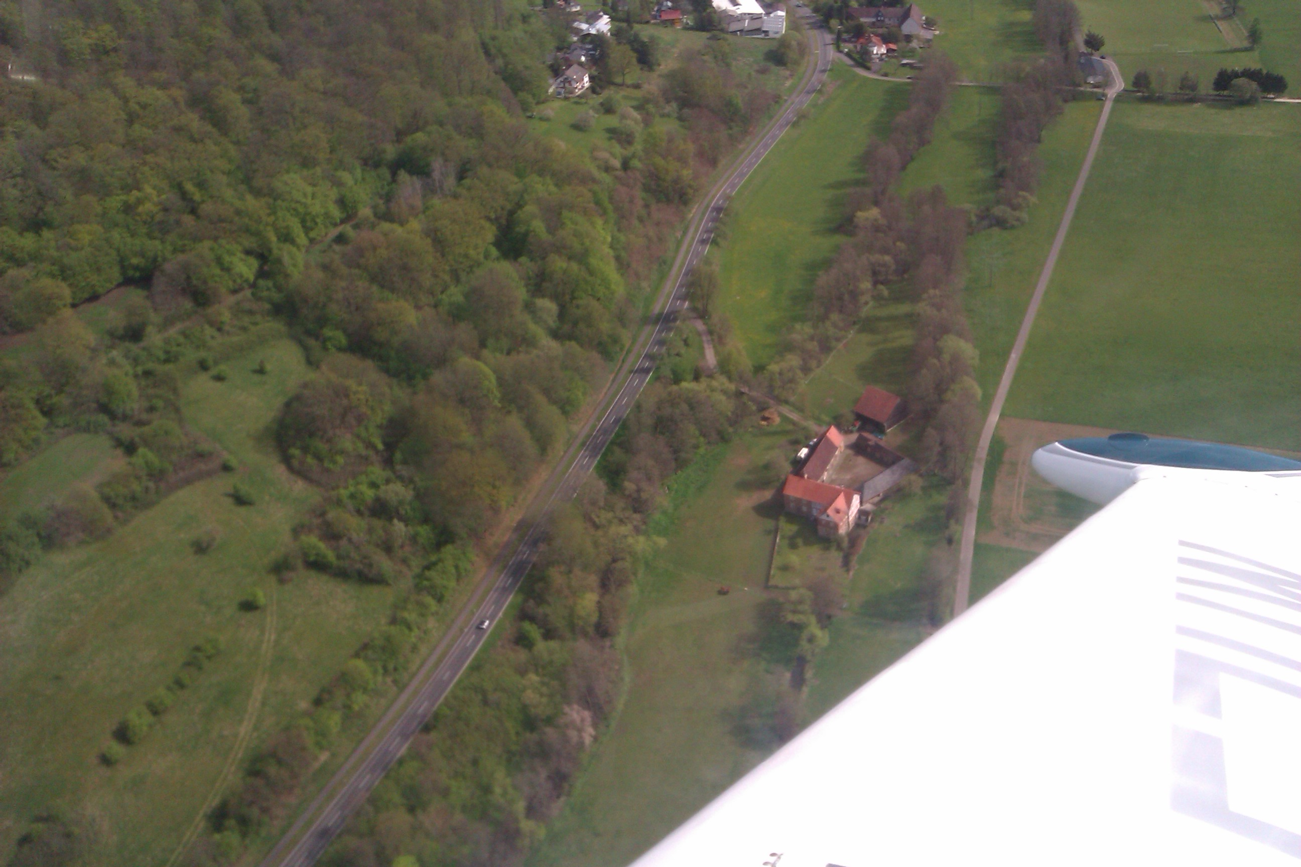 Neumühle (Hessen) aus einer Meta Sokol heraus fotografiert.